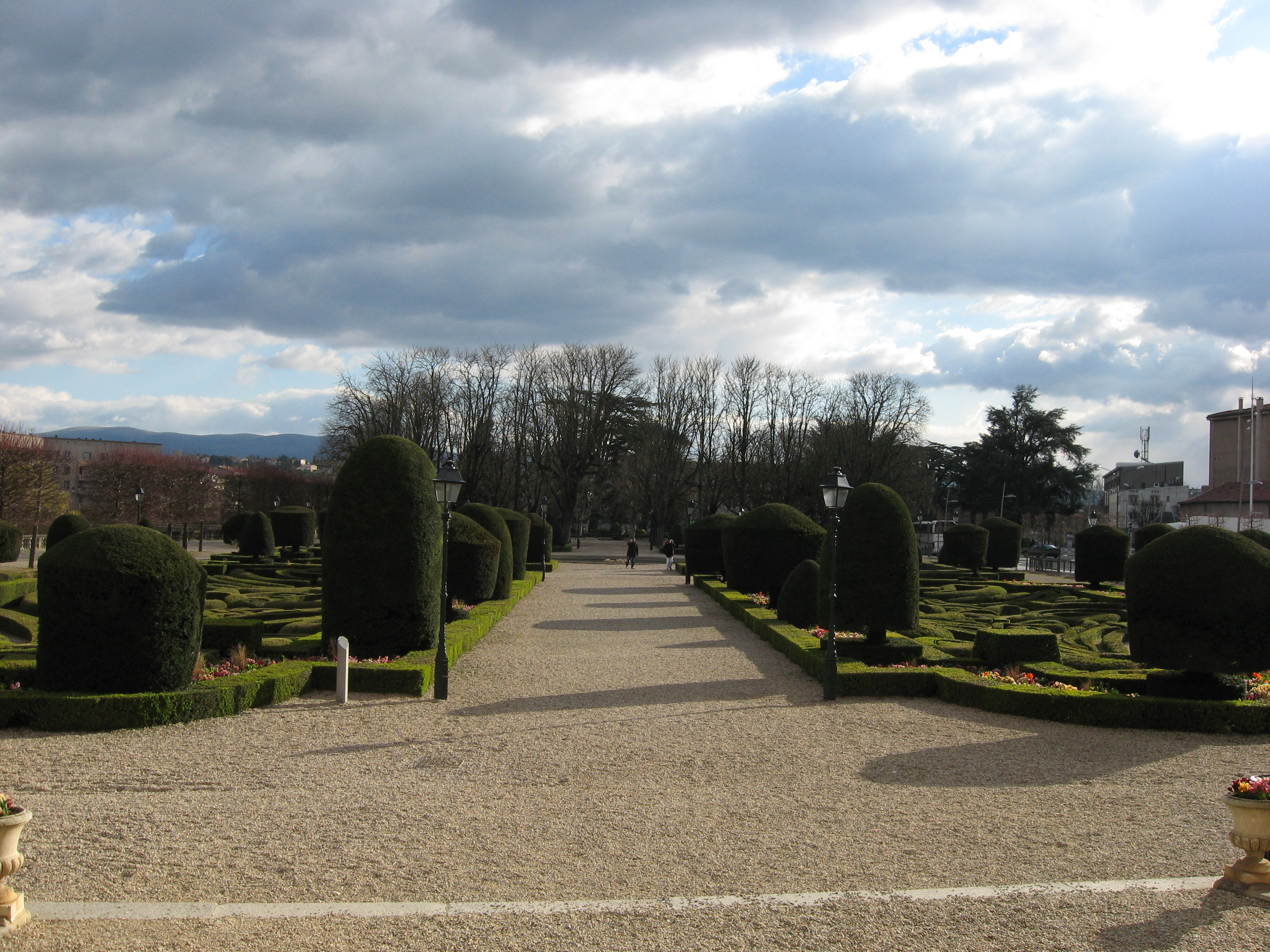 Jardin de l'Evêché à Castres